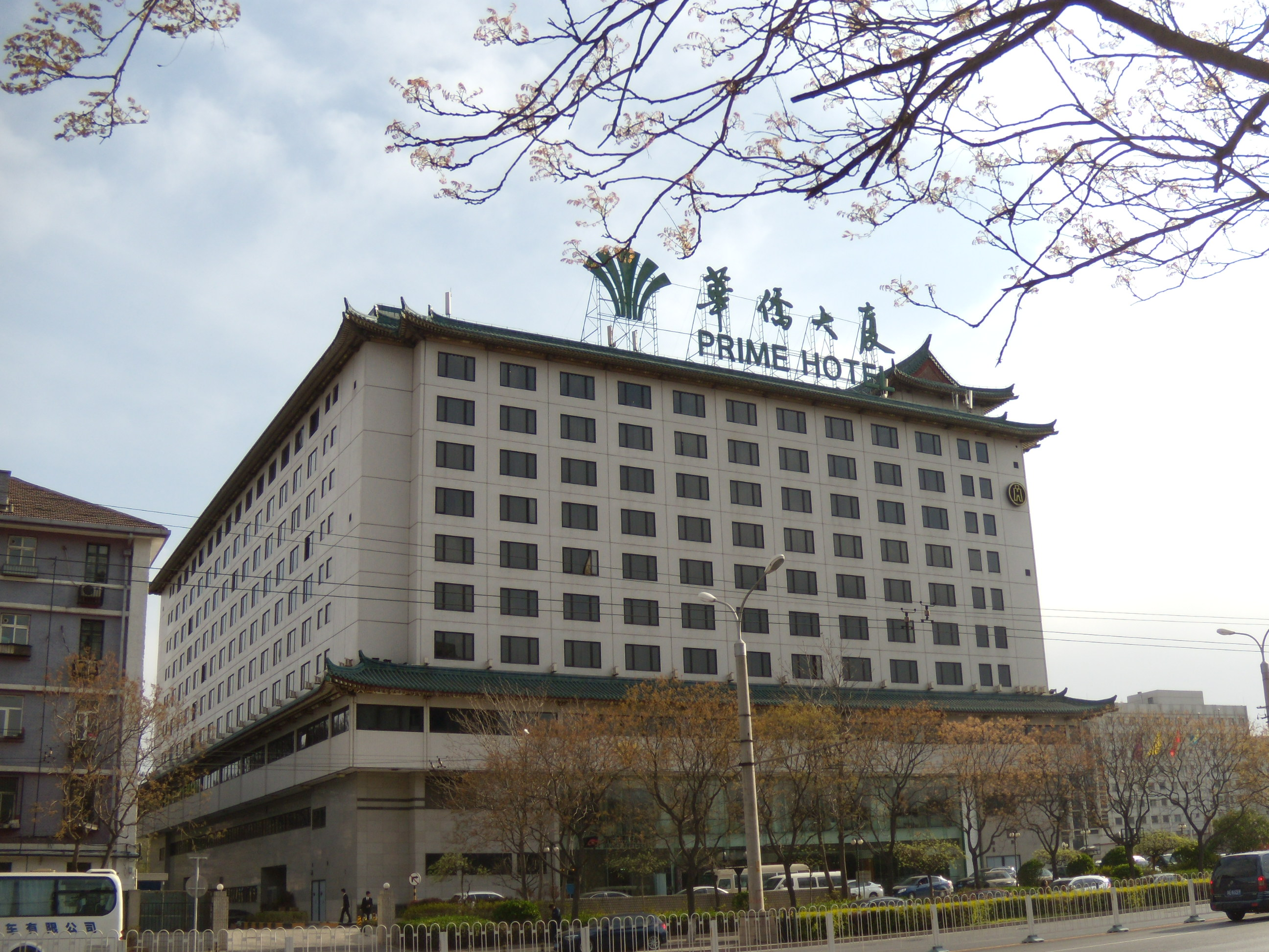 北京华侨大厦